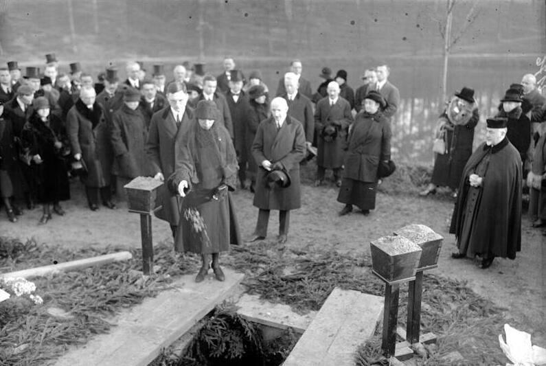 Die Beisetzung des durch Selbstmord geendeten Kunstmäzen, Paul Cassirer, fand unter kolossaler Beteiligung aus dem Künstlerkreise in Berlin statt. Die Tochter des Verstorbenen, Suzanne Aimee Cassirer, am Grabe.